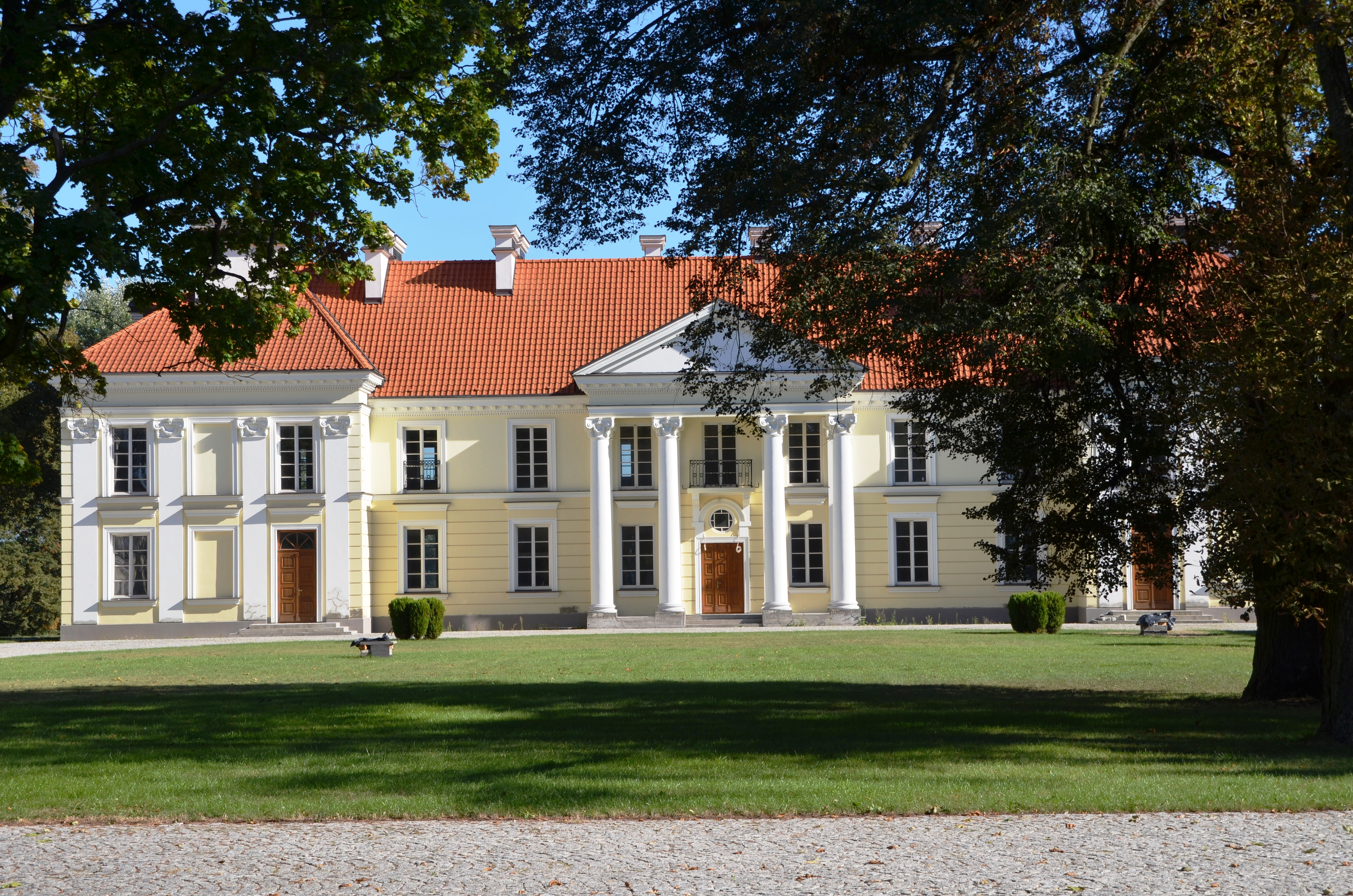 Wyszków, pałac, 1780, XIX